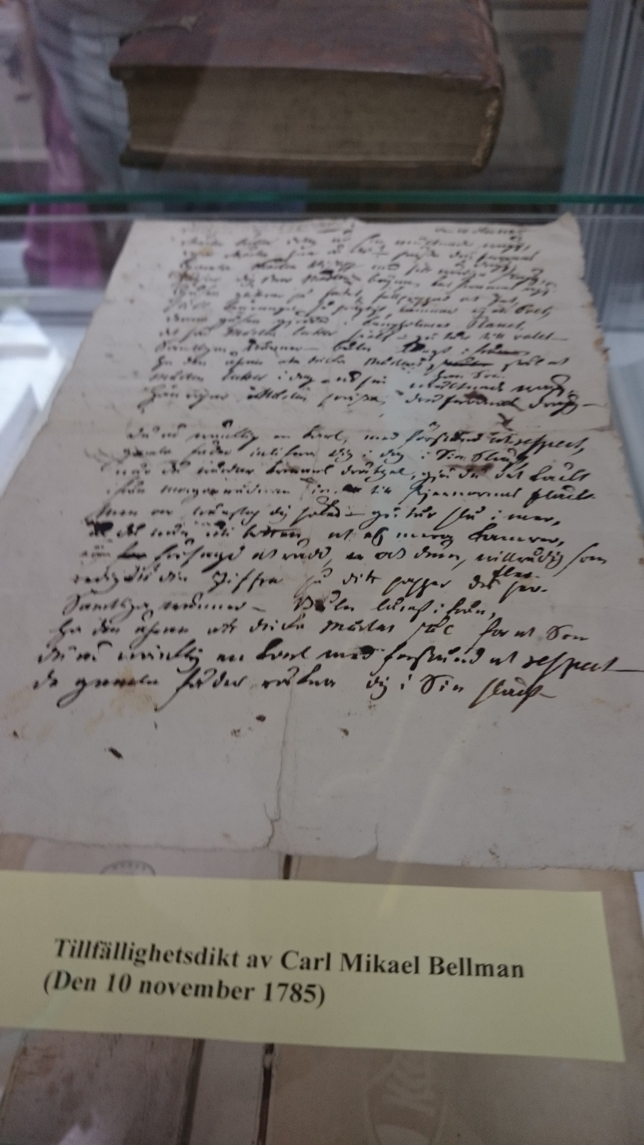 Tillfällighetsdikt av Carl Michael Bellman i Borgå Gymnasiums bibliotek.